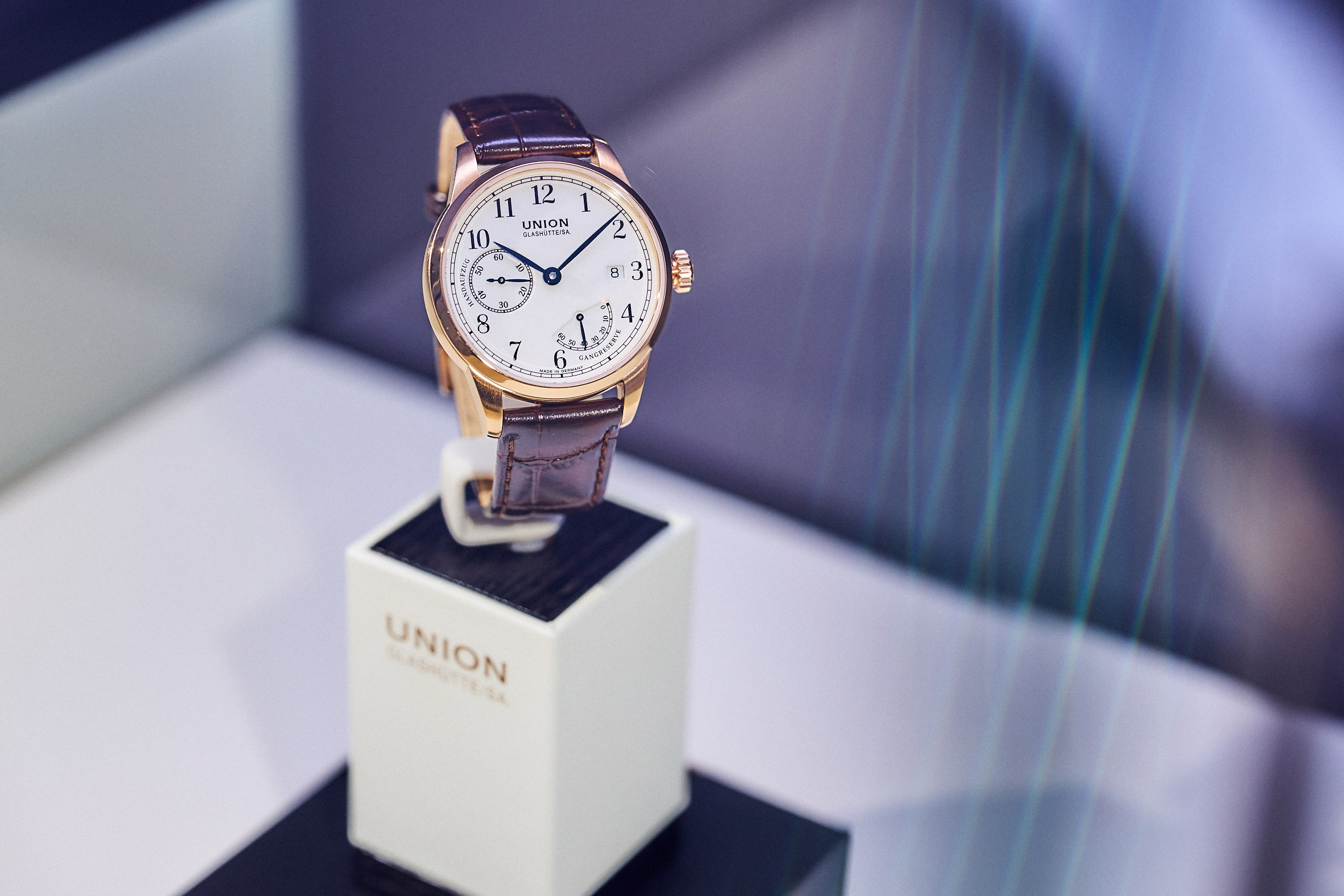 1893 Johannes Dürrstein Limitierte Edition 2018